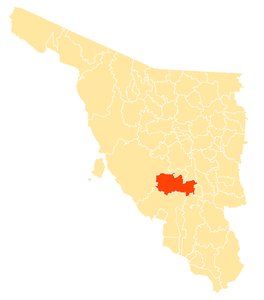 Municipio dentro de Sonora, México.